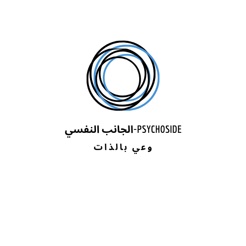 شعار الجانب النفسي مجونة للتوعية النفسية